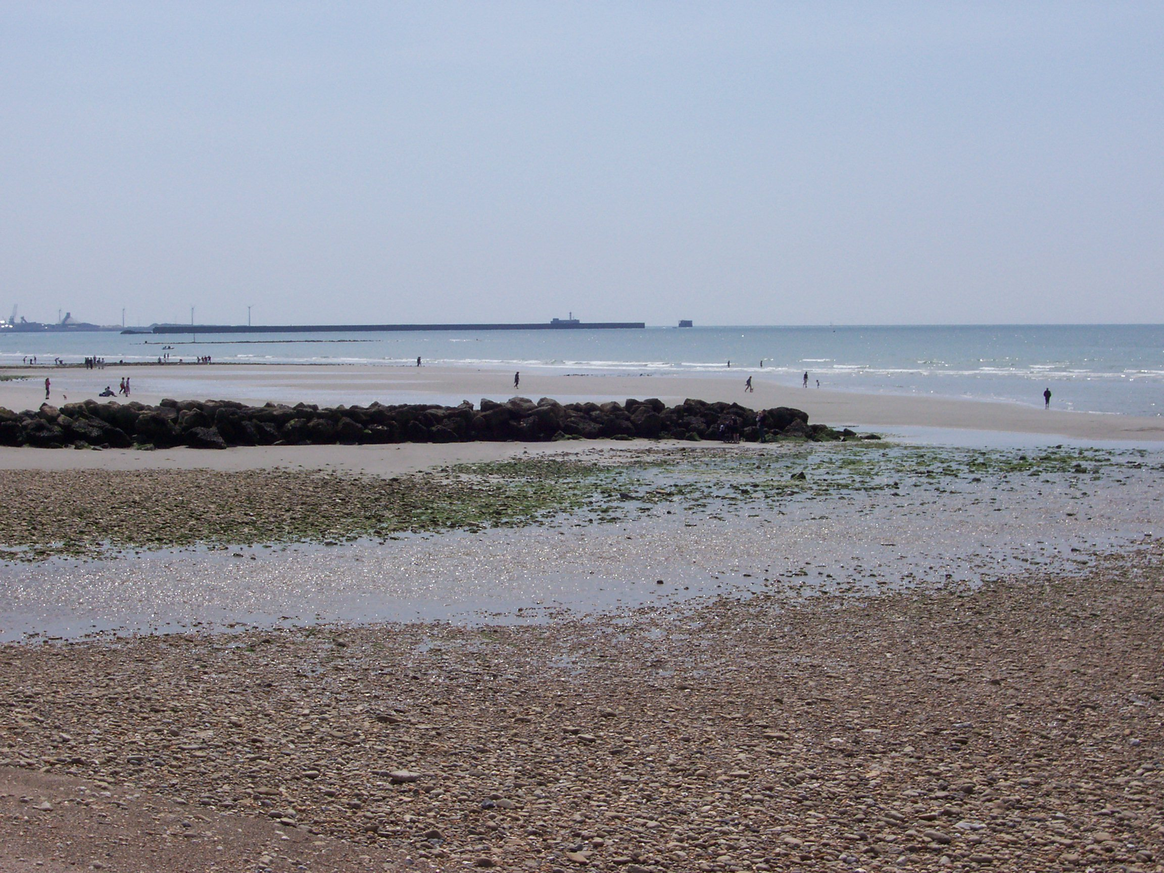 Plage de Wimereux, au niveau de l'embouchure du fleuve du Wimereux ; commune du Pas-de-Calais en France. Au premier plan, les eaux du fleuve qui s'écoulent dans la mer.